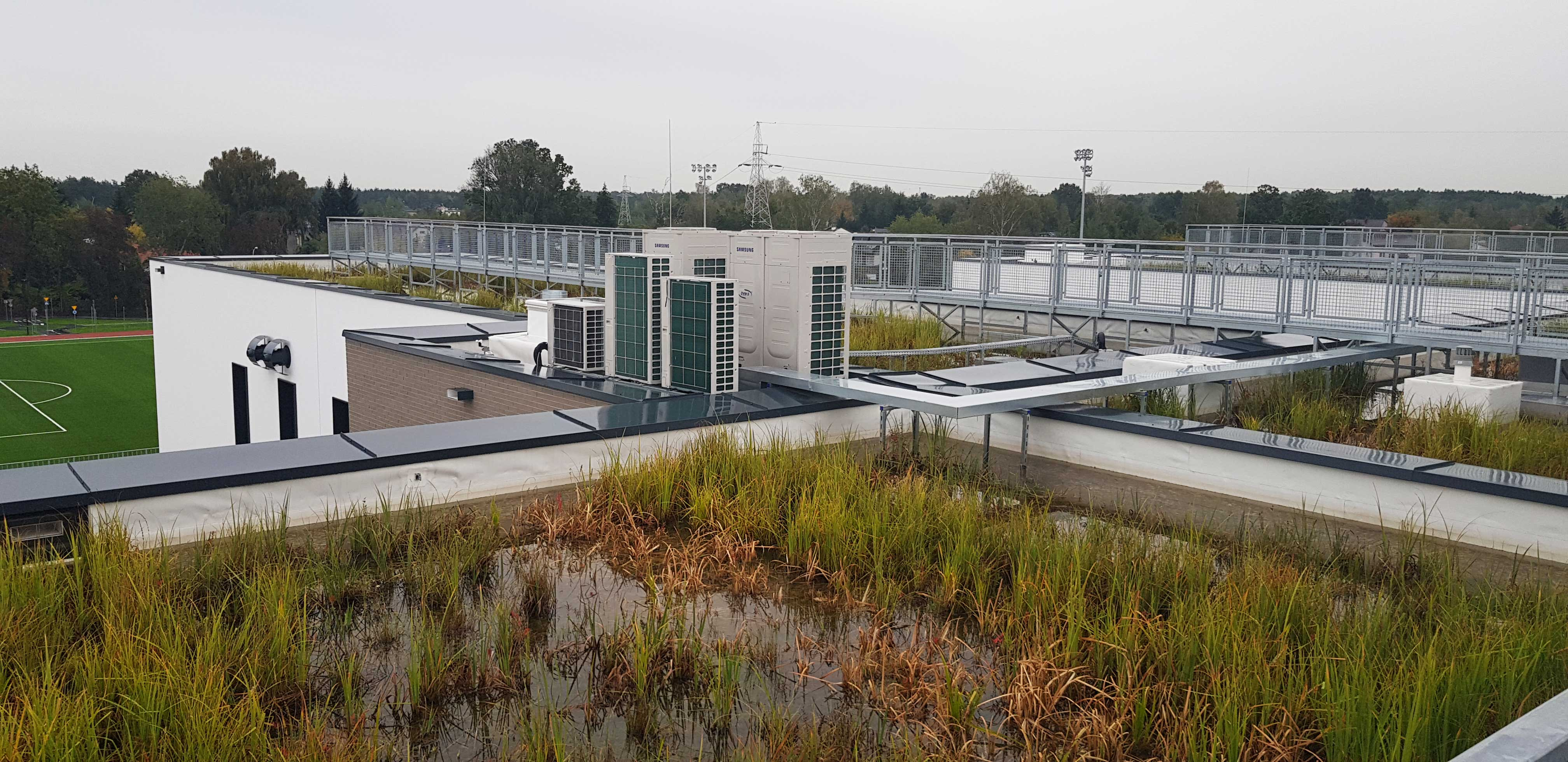 MCER - Widok dachu bagiennego z pomostu ścieżki przyrodniczej na budynku A